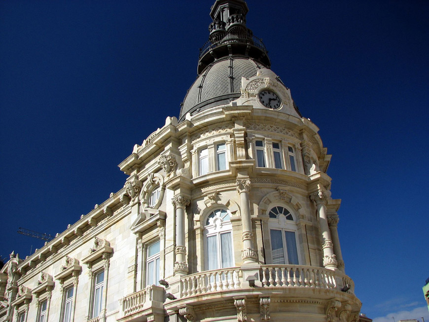 Palacio Consistorial de Cartagena. Obra modernista de Tomás Rico Valarino de 1907.